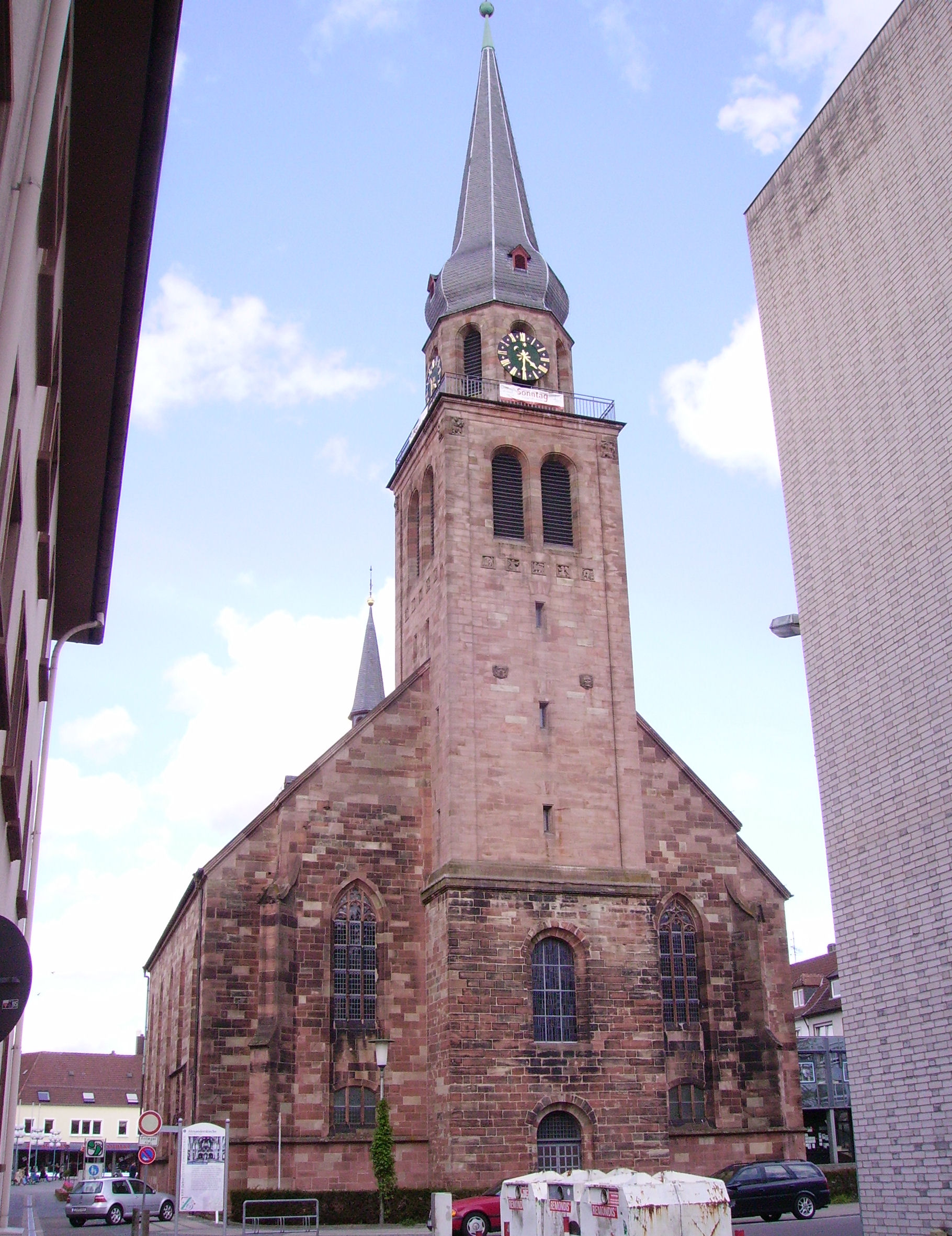 church in Zweibrücken, Germany